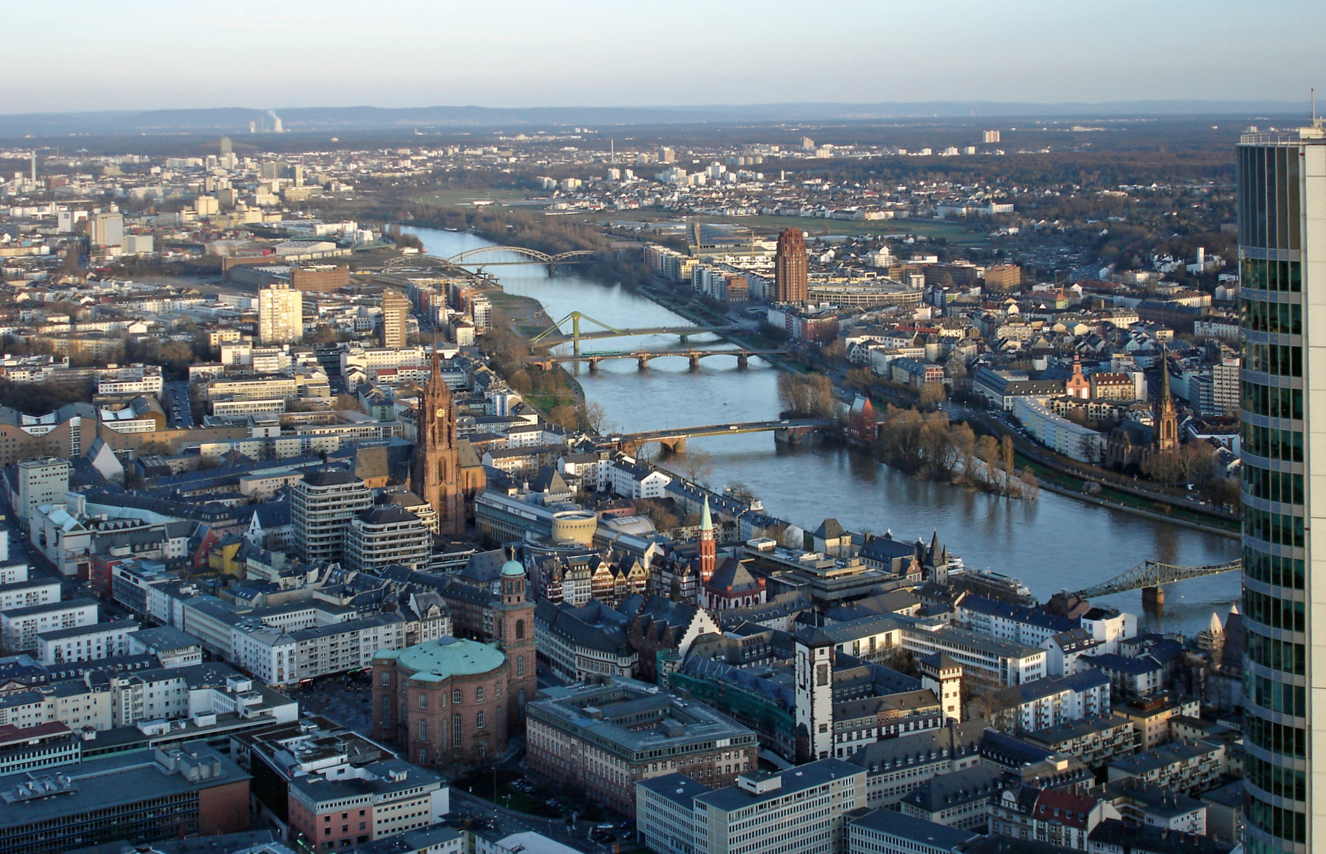 Der Main in Frankfurt vom MAINTOWER aus, flussaufwärts